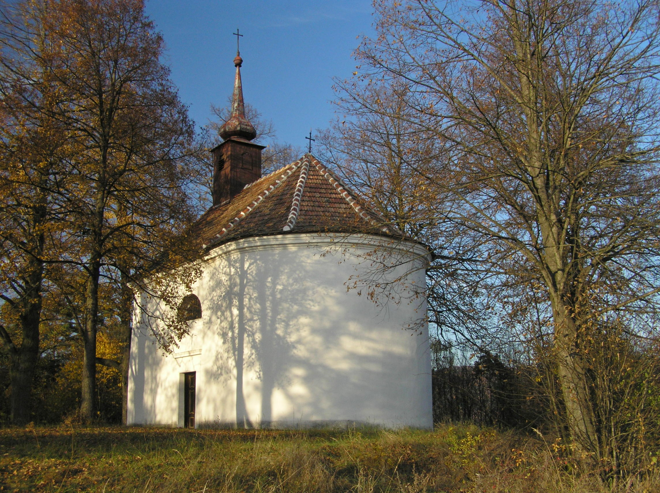 Kaple na Bozince (Doubravník)